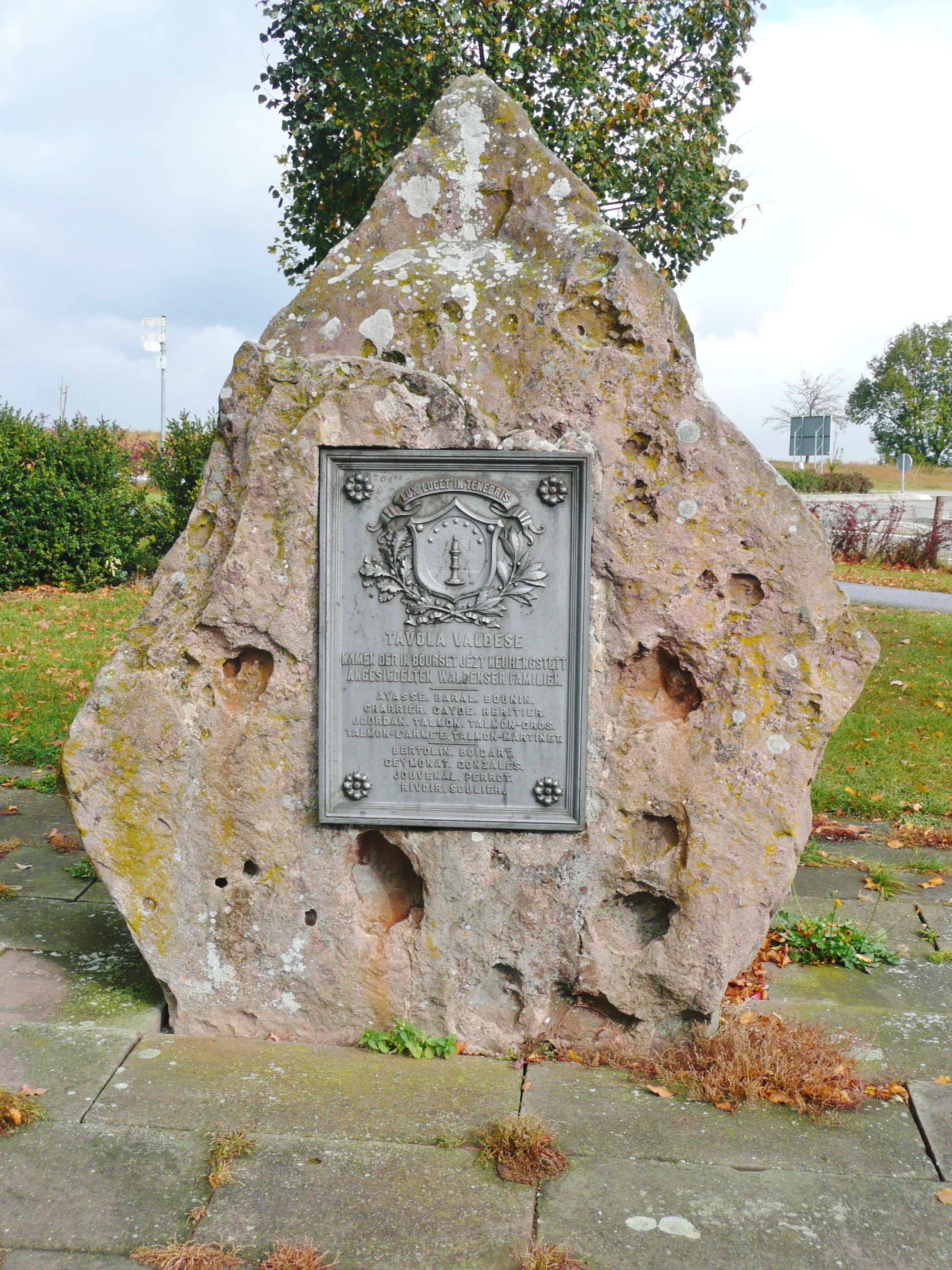 Waldenserstein in Neuhengstett. Inschrift auf der Platte auf der Steinvorderseite: "TAVOLA VALDESE – Namen der in Bourset jetzt Neuhengstett angesiedelten Waldenser Familien. – Ayasse. Baral. Bounin. Charrier. Gayde. Heritier. Jourdan. Talmon. Talmon-Gros. Talmon-L'Arme'e. Talmon-Martinet. – Bertolin. Boidart. Geymonat. Gonzales. Jouvenal. Perrot. Rivoir. Soulier." Inschrift auf der Platte auf der Steinrückseite: "Eberhard Ludwig, regierender Herzog zu Württemberg hat die ihres glaubend wegen vertriebenen Waldenser anno 1699 in seinem Lande aufgenommen. Zum Andenken an jene Zeit wurde dieser Stiftsgarten angelegt von einer Generalconsul von Georg II - Georgenau und seiner Gattin Sophie, Tochter des Finanzministers von Gärttner und mit dem Beistand der Herren Pfarrer Schnapper und Schultheissen Ayasse in Neuhengstett und des Herrn Altschultheissen Lauxmann in Möttlingen. 3. Mai 1881"